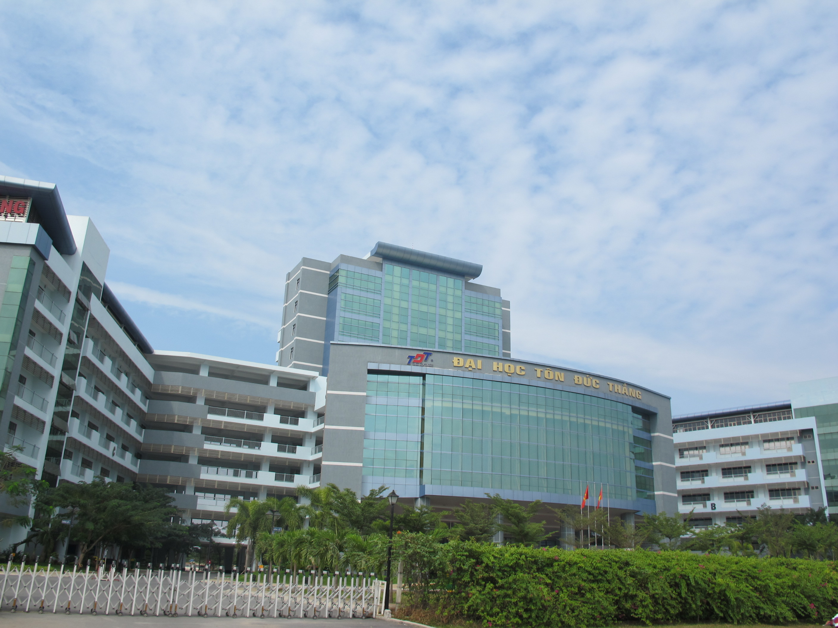 trường Đại học Tôn Đức Thắng, q7,tp hcm vn